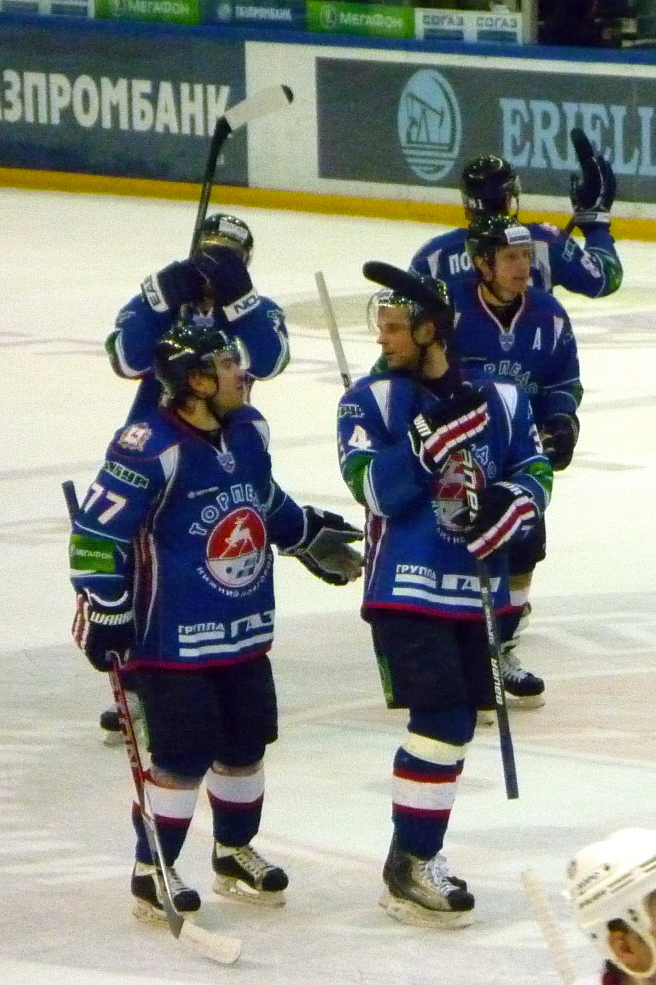 Игроки «Торпедо» Александр Евсеенков (слева) и Сергей Вышедкевич (справа) беседует после матча «Торпедо» - СКА 12 декабря 2010